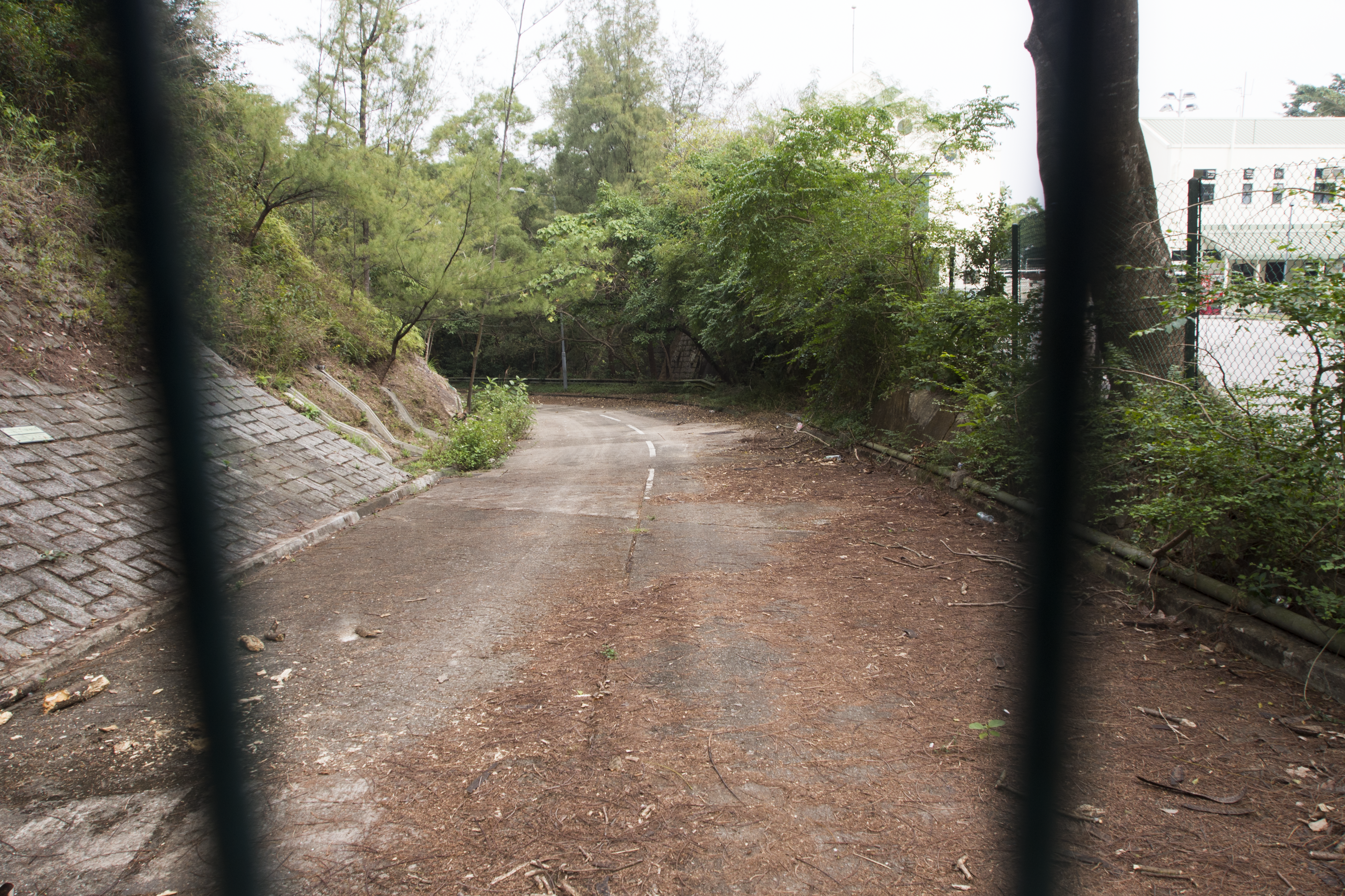 中文（香港）: 位於鯉魚門公園及度假村內之鯉魚門騎術學校旁，通往海傍、跨過東區走廊之道路。可見其保養欠佳，久未打掃。